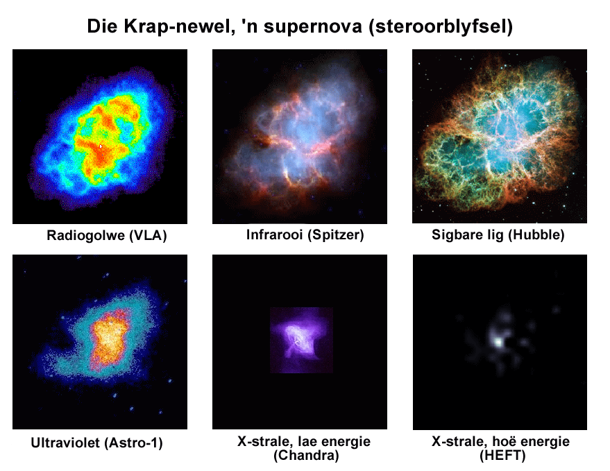 Die Krap-newel soos afgeneem deur verskillende soorte teleskope.